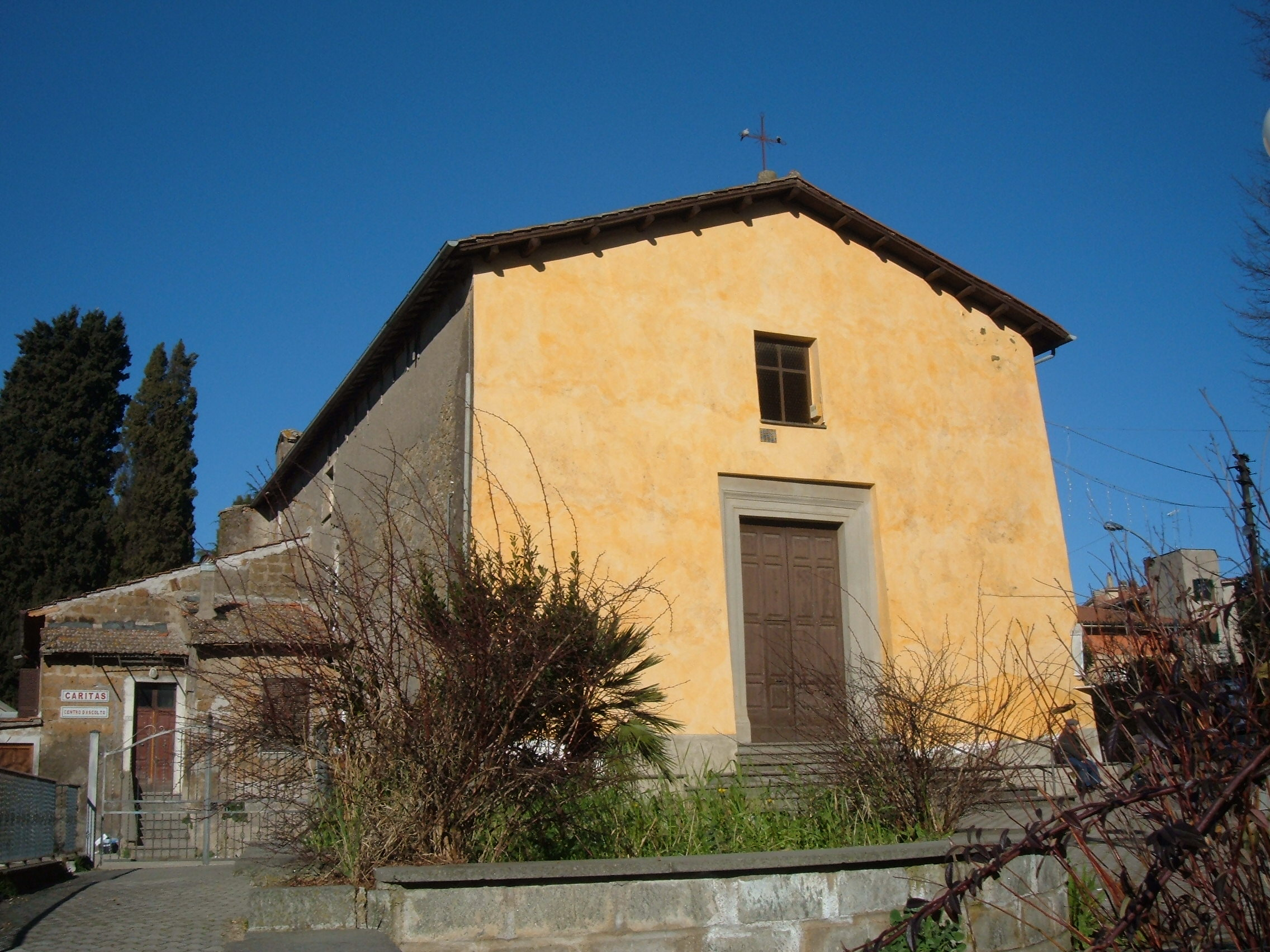 Chiea di San Gratiliano (Bassano Romano)